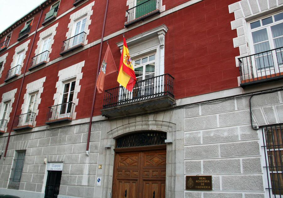 Palacio del Marqués de Villafranca, sede de la Real Academia de Ingeniería de España, en la calle de don Pedro (Madrid).